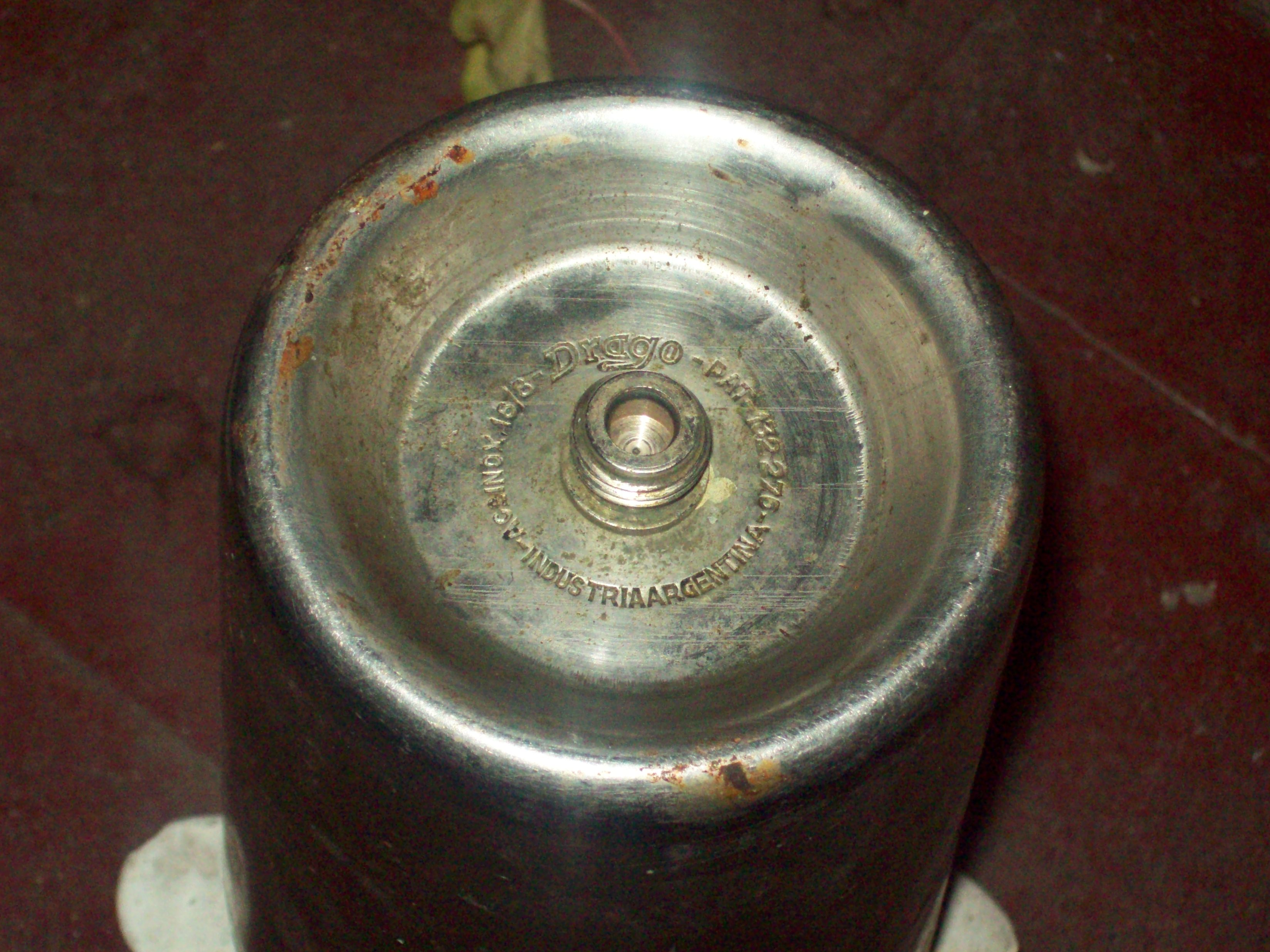 Es una toma de la cola de un sifón Drago, la rosca es para enroscar la garrafa para recargarlo.